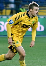 Евгений Будник в матче с "Черноморцем", в котором он забил свой первый гол за "Металлист" и решил судьбу матча (1:0).